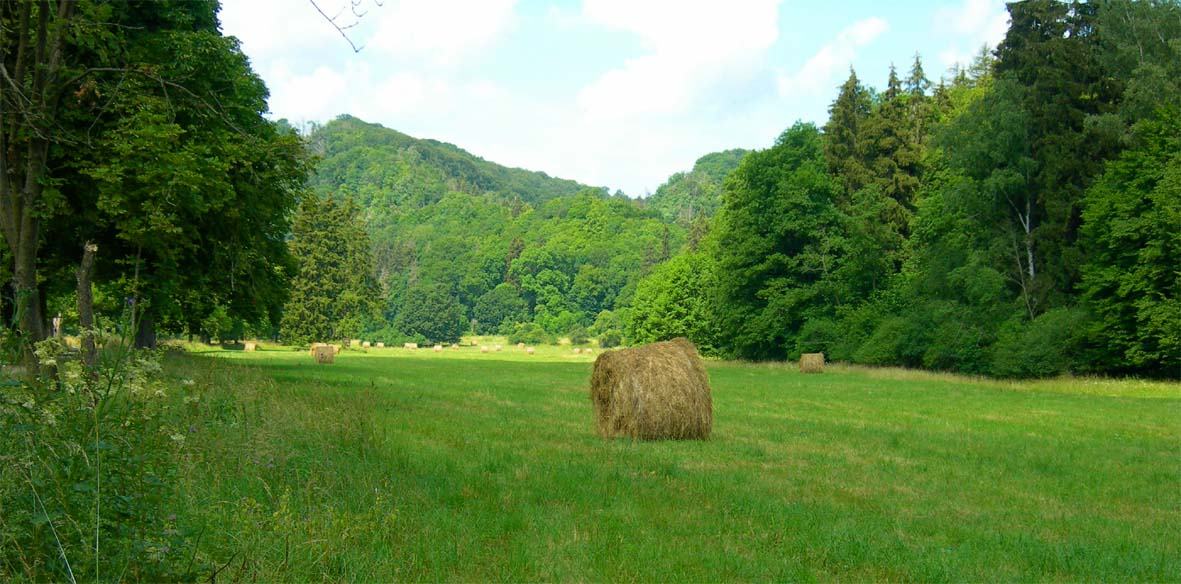 Heu-Rundballen im Selketal bei Meisdorf